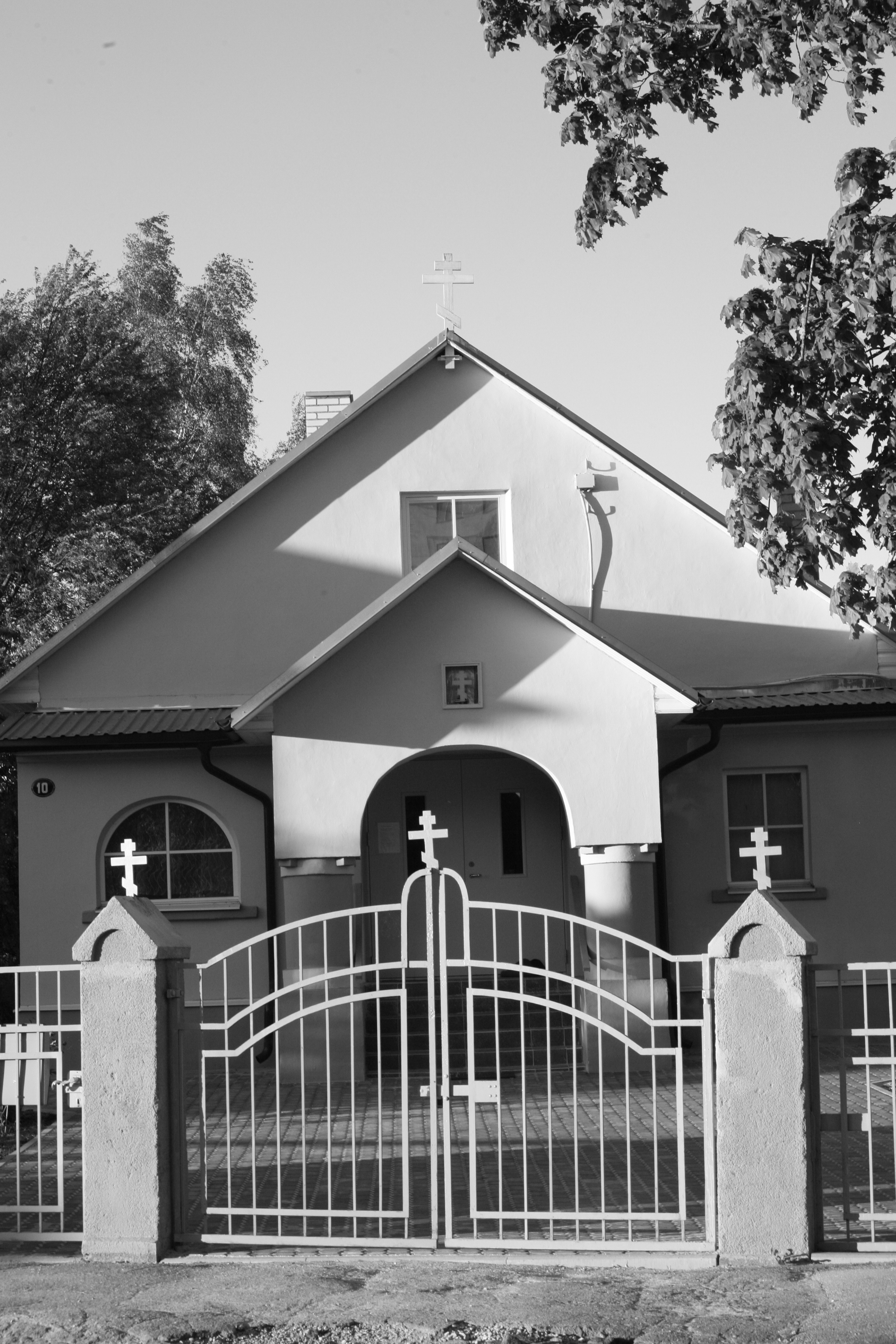 Vanausuliste palvemaja, Põik tn, 17.06.2015